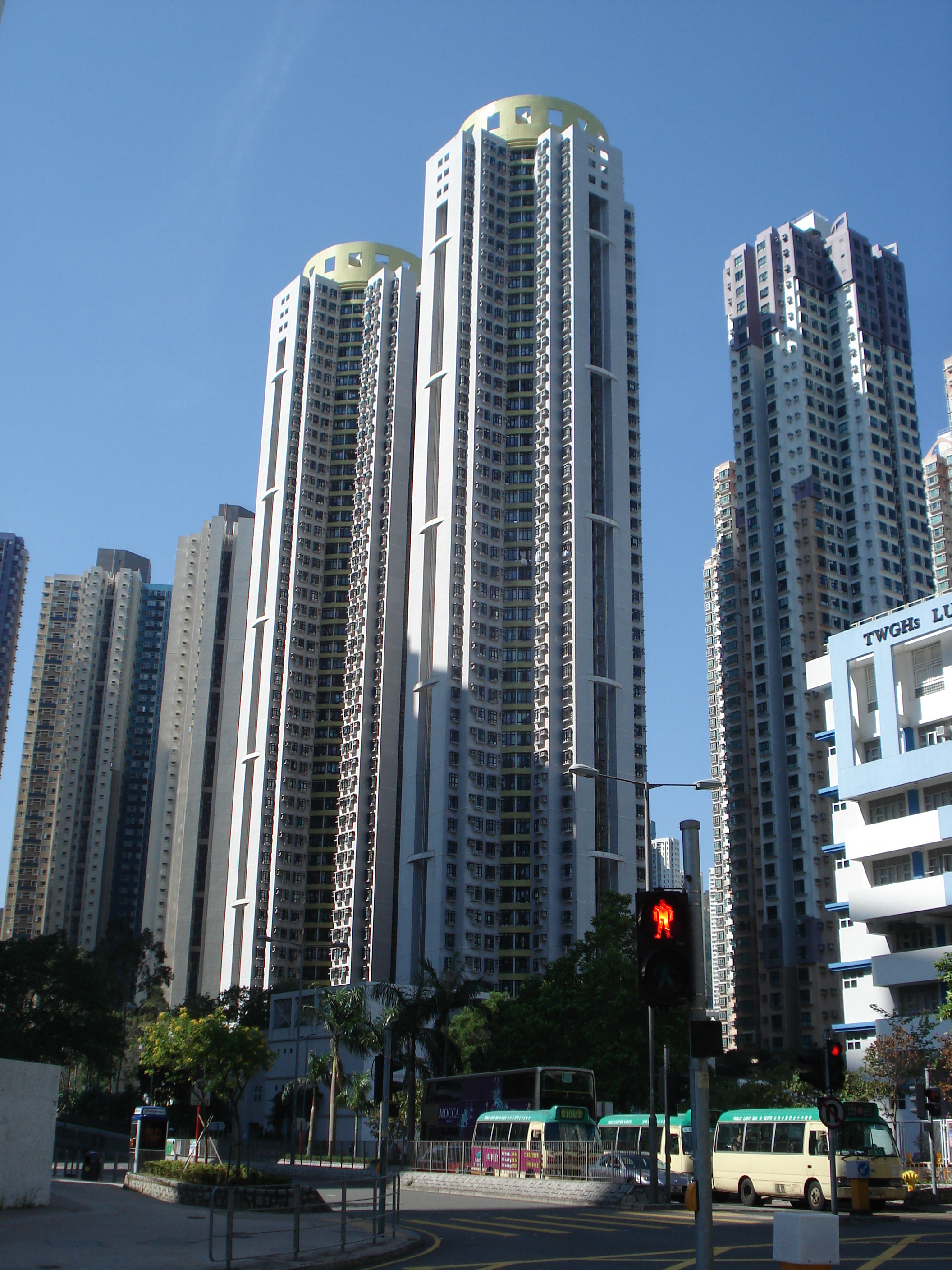 旭輝臺 - Radiant Towers